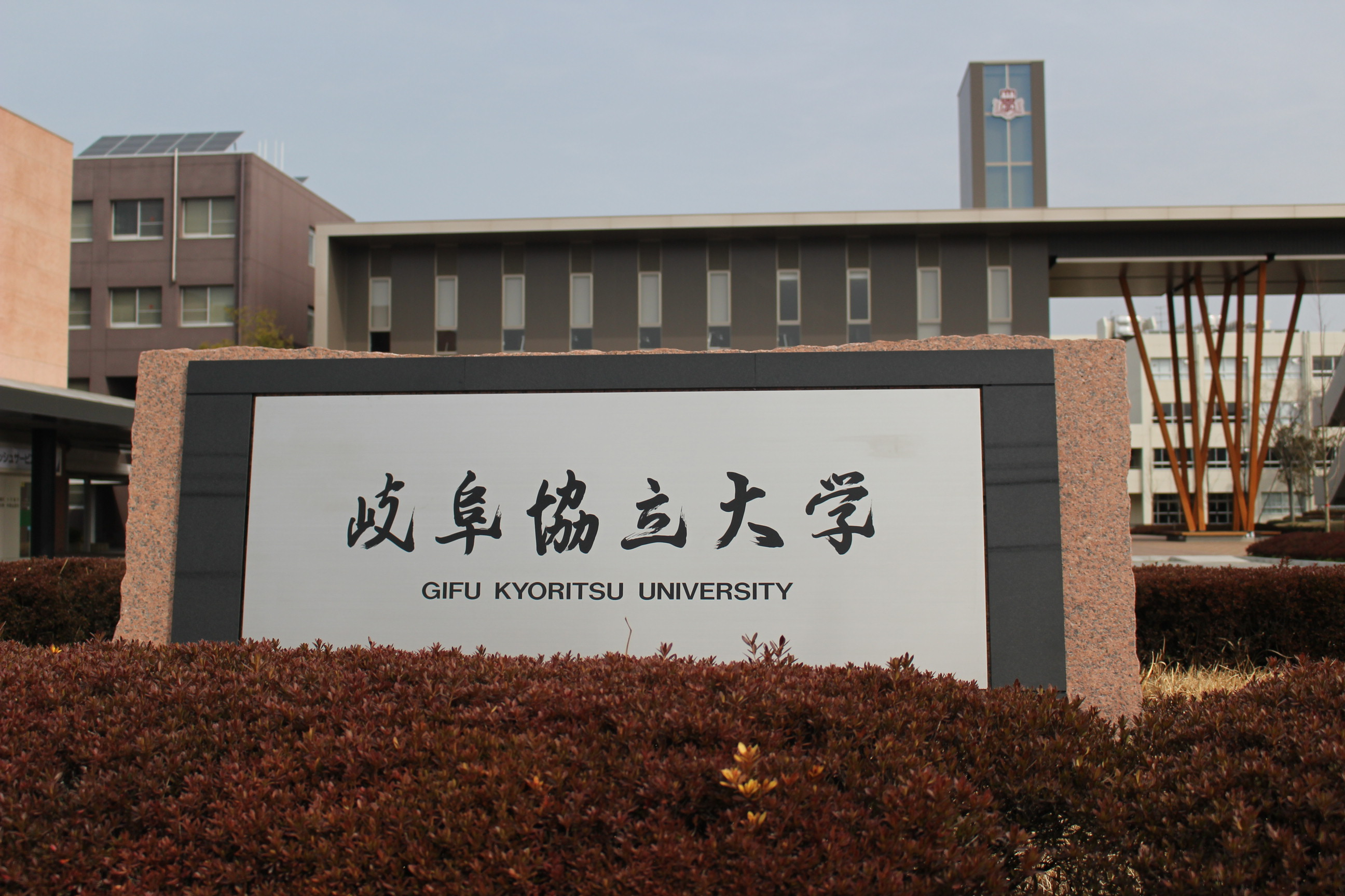 大学の正門写真